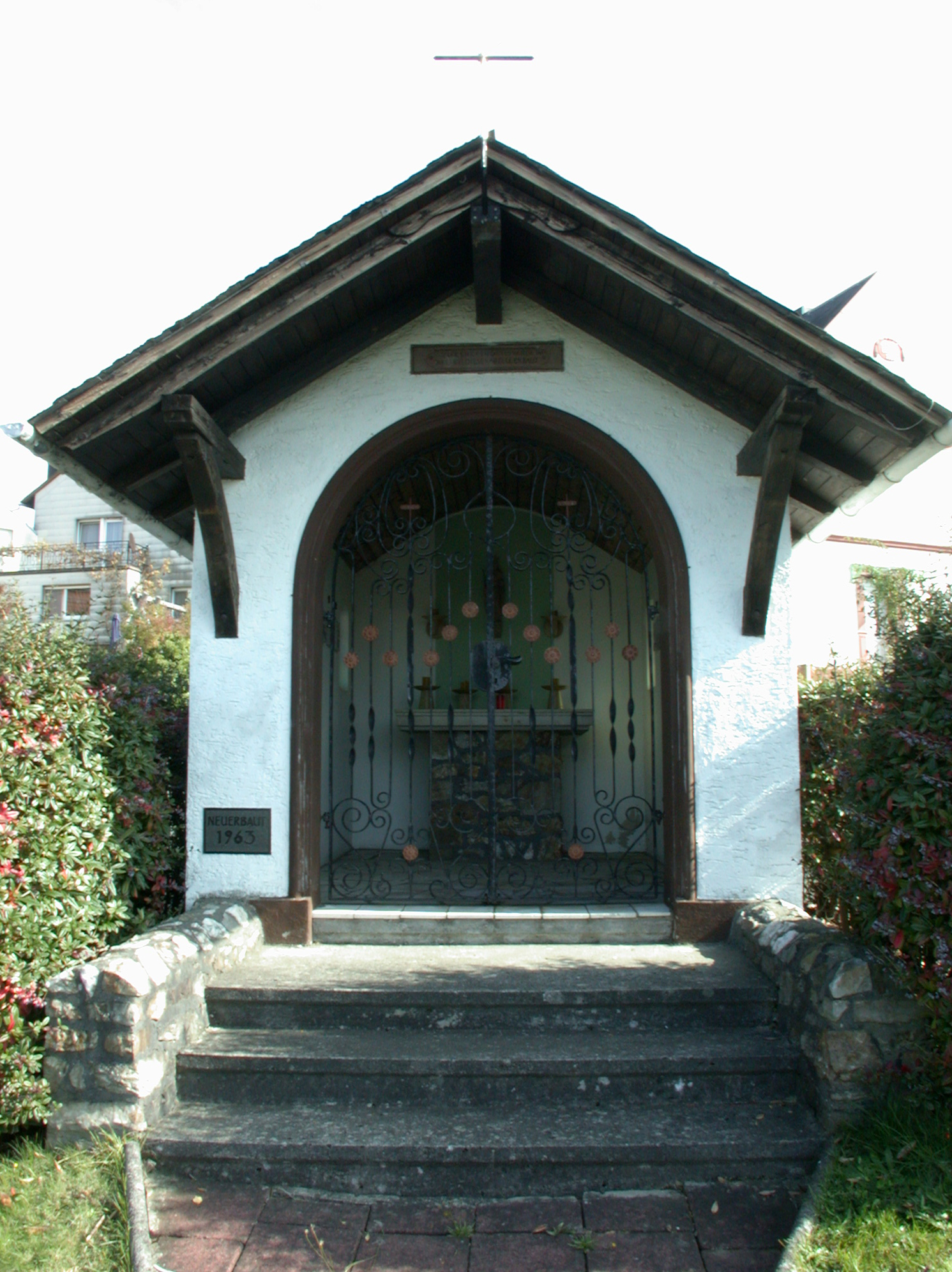 Heiligenhäuschen Selters-Haintchen